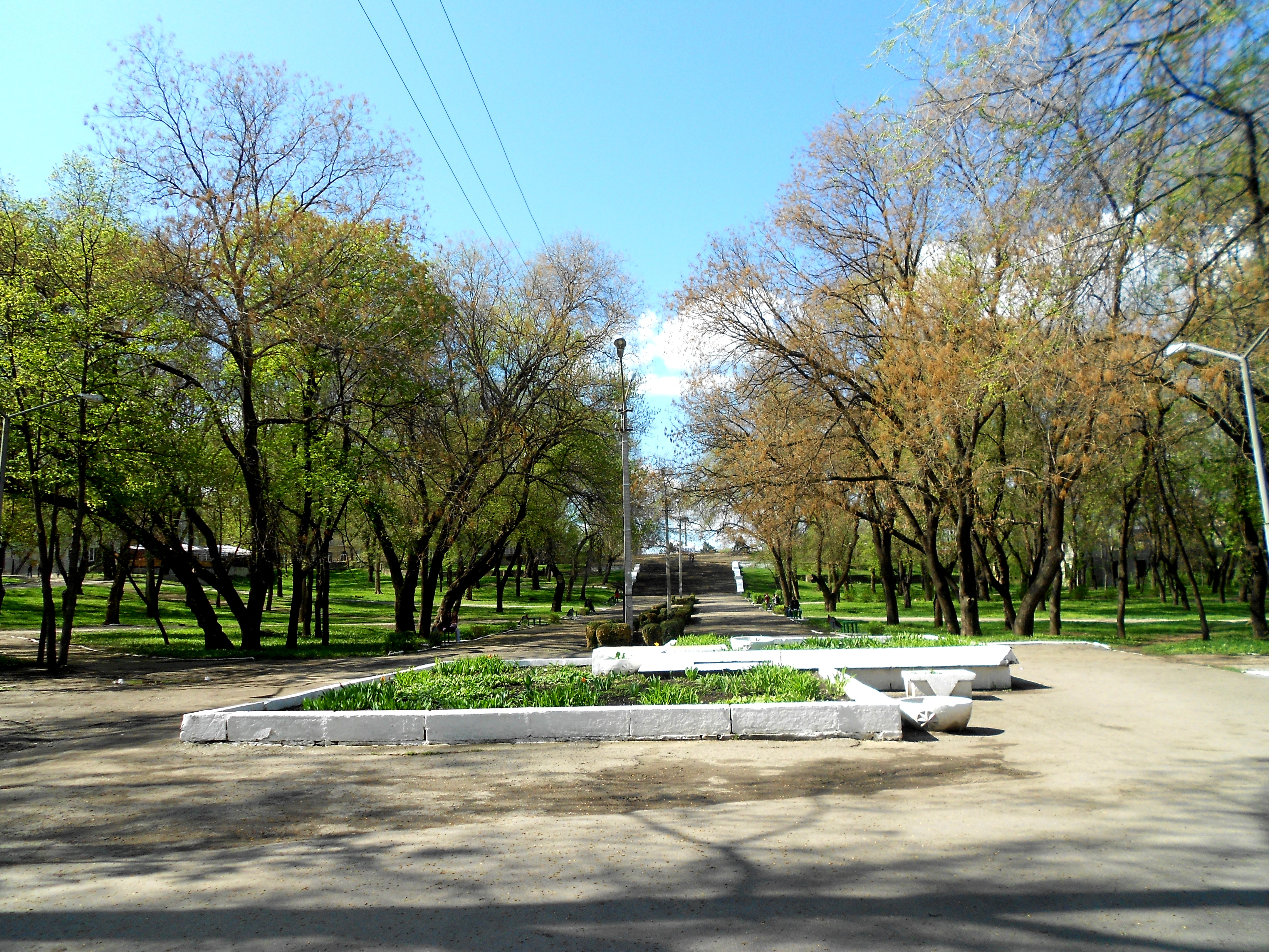 Parcul Central din municipiul Bălți